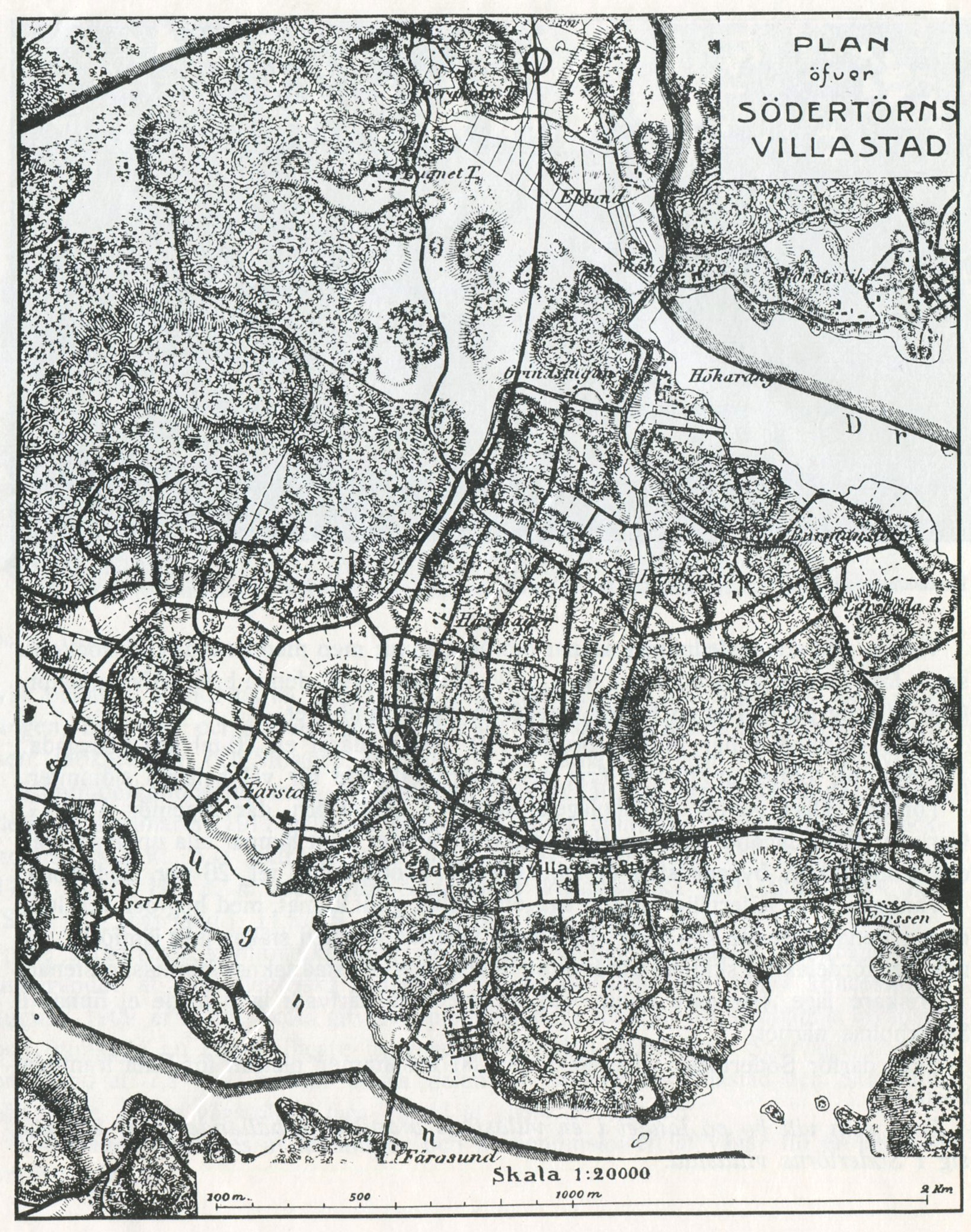 Karta över "Södertörns villastad"